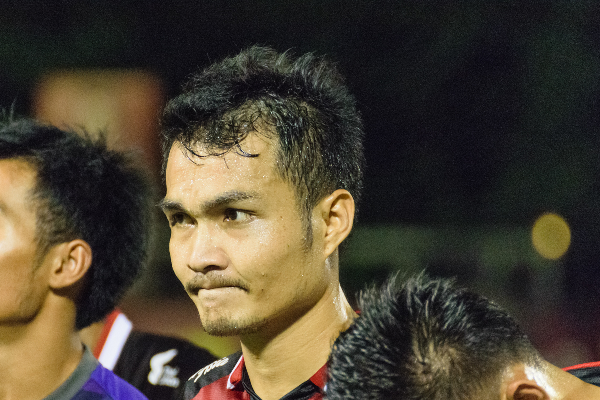 Nikom Somwang